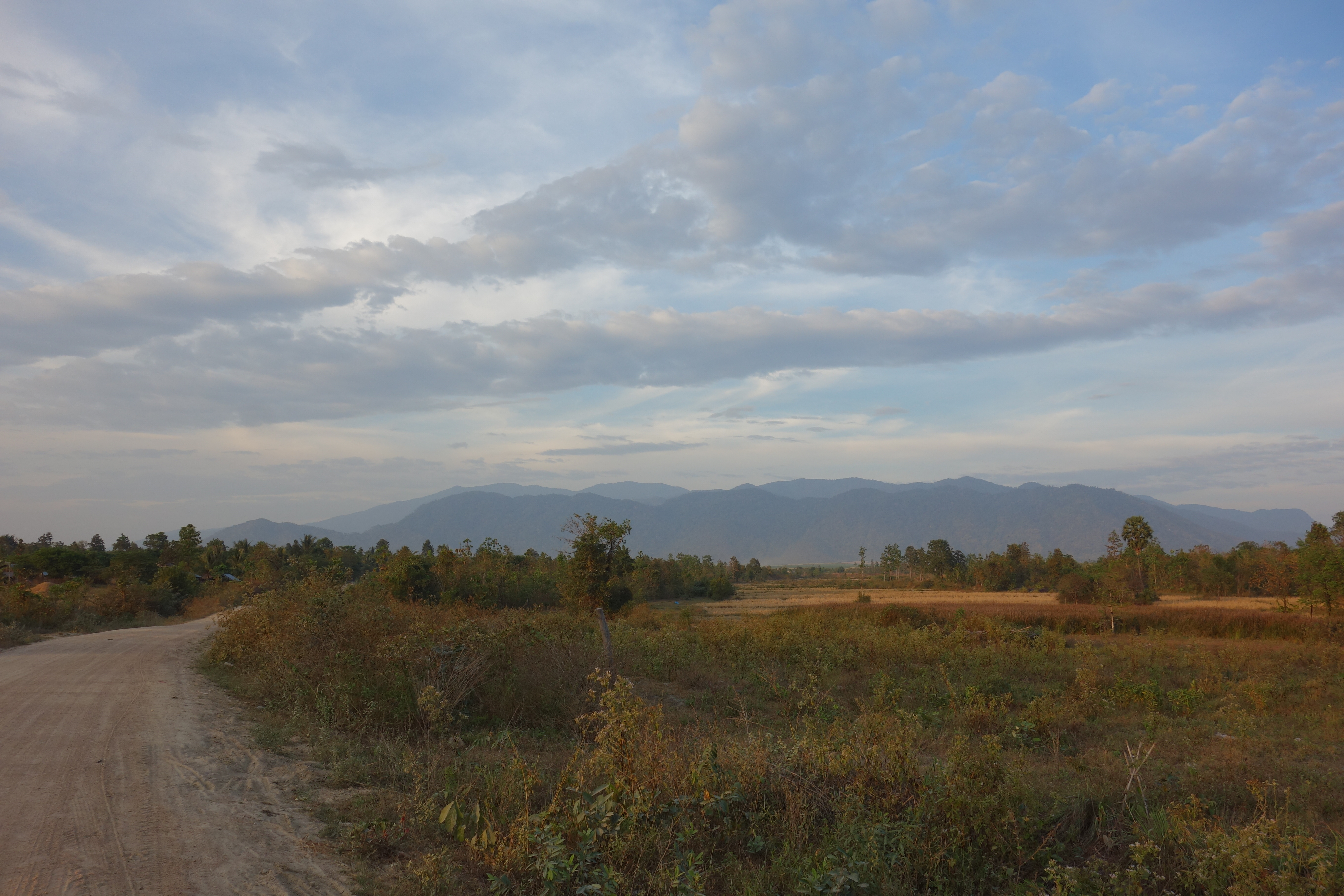 Der eigentliche Gipfel ist der zweite von links auf dem hinteren Bergkamm